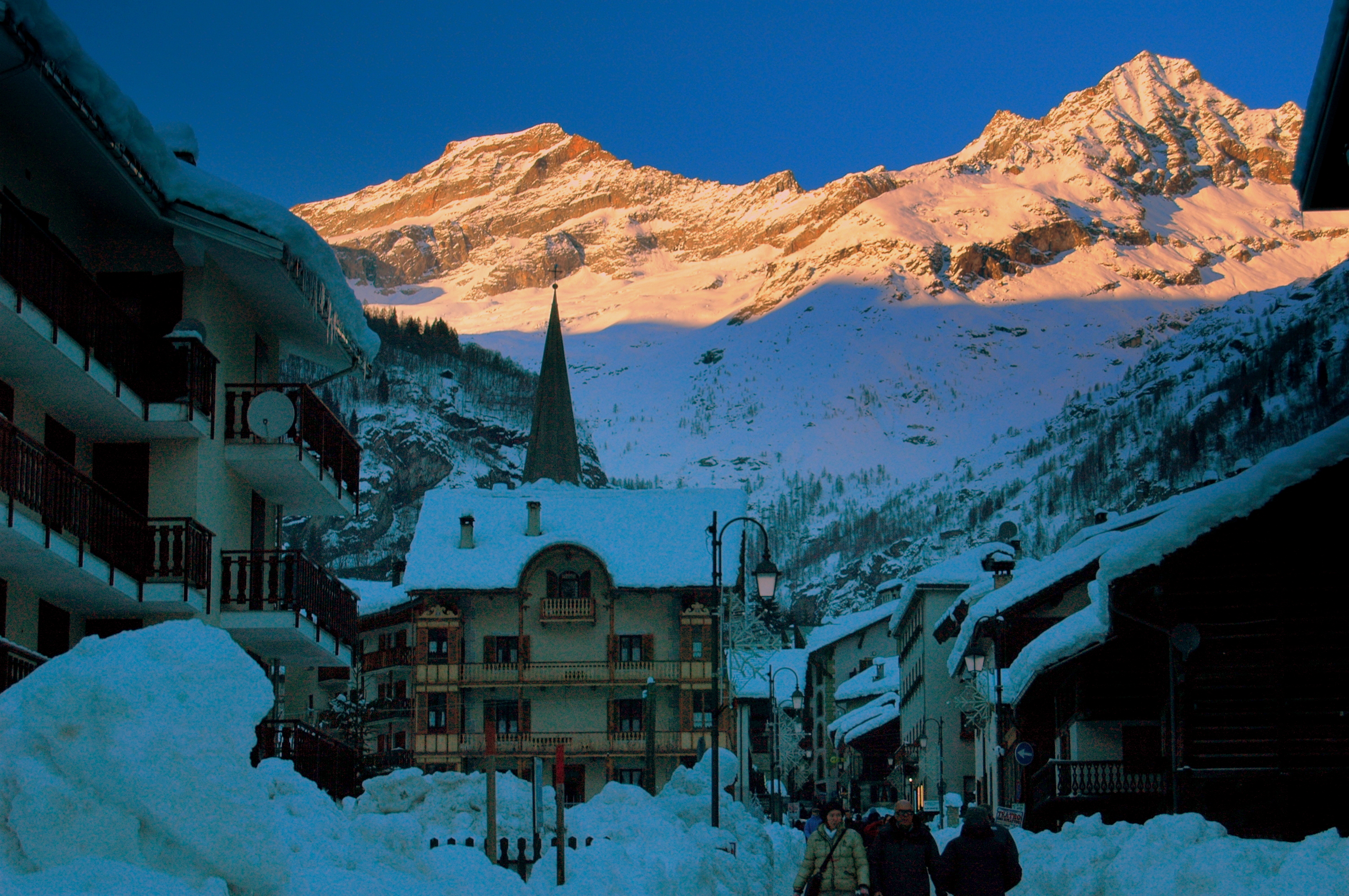 La Punta Grober m.3497 e i lMonte del Turlo m.3128 viste dal corso